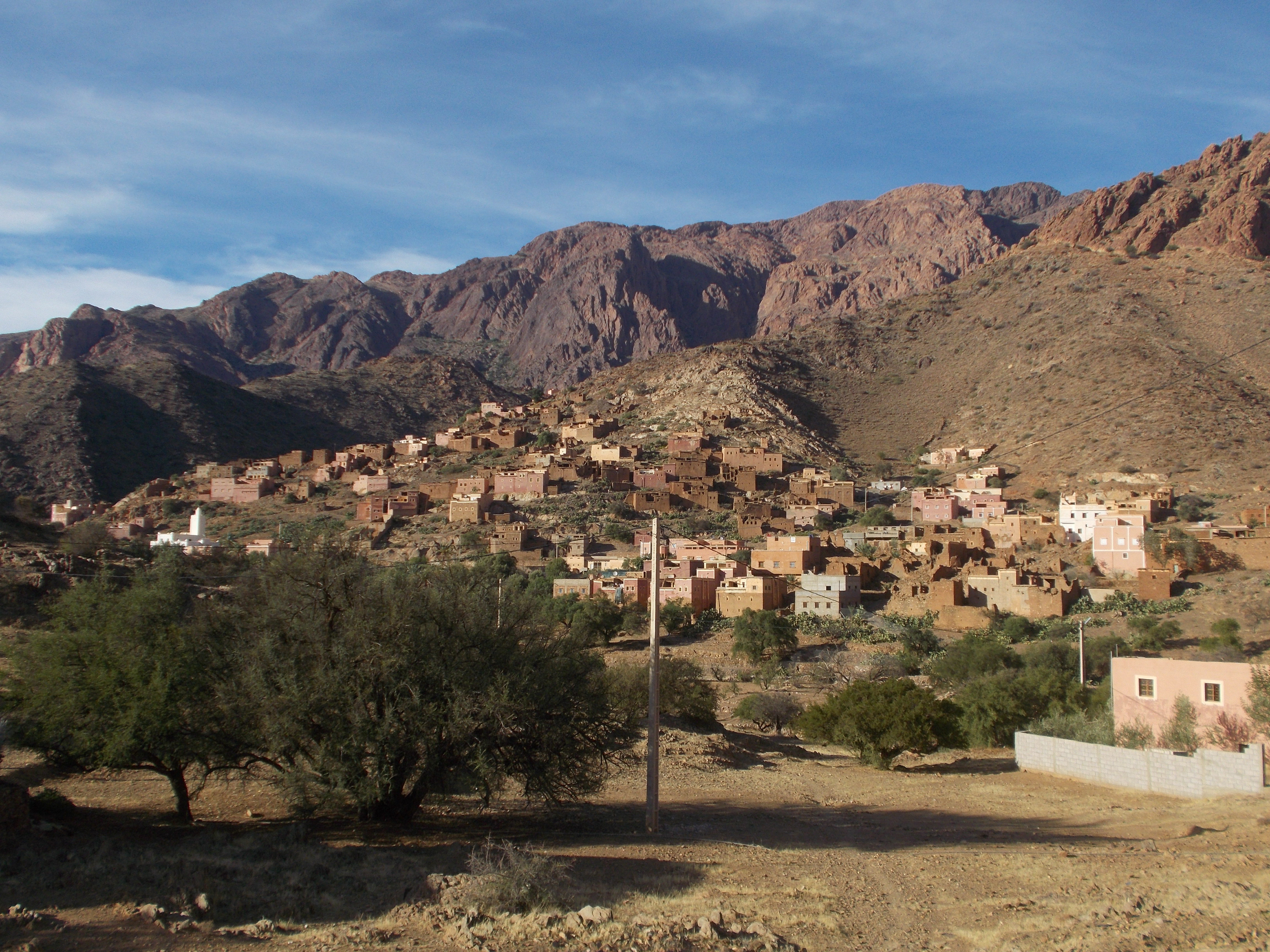 Dorf (Imi Ntizeght) im Tal der Ammeln